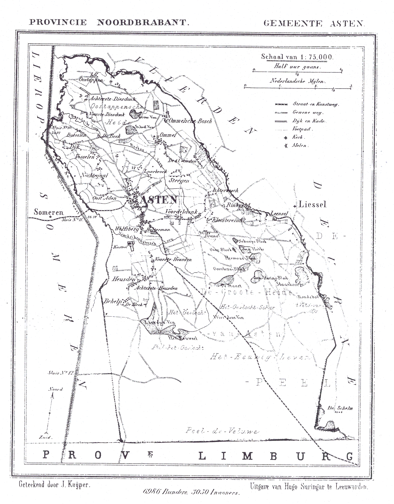 Nederland, Noord-Brabant, Gemeente Asten